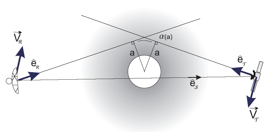 Zur Herleitung der Residuenfrequenz